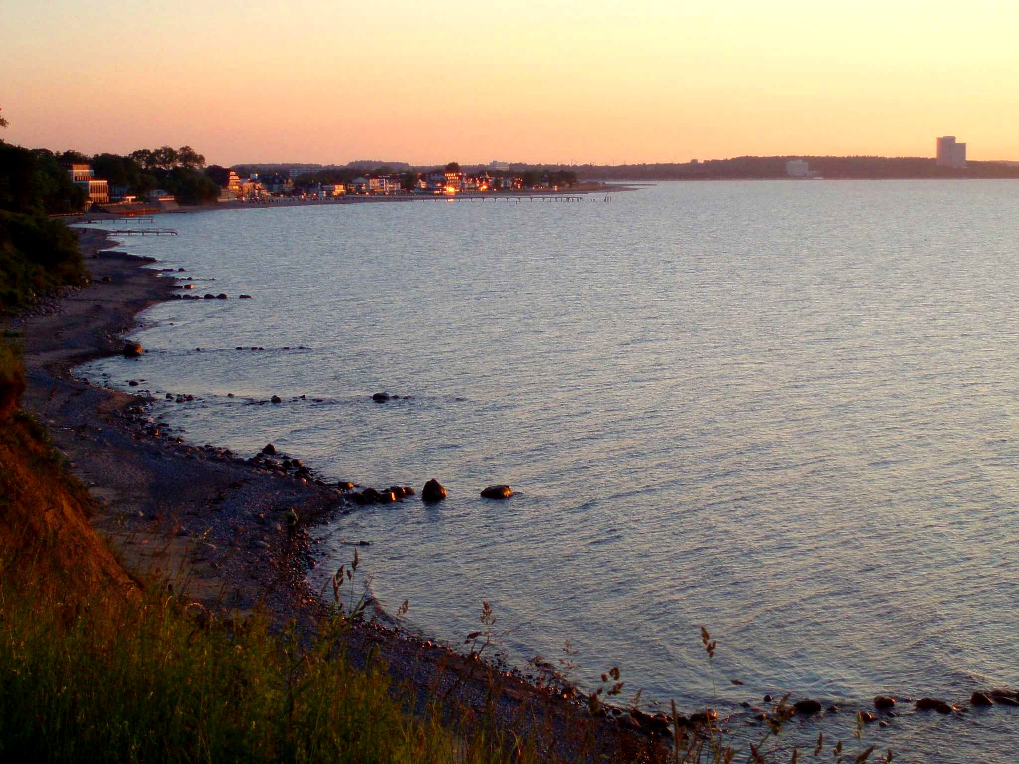 Blick auf Niendorf (links), Maritim Seehotel Timmendorfer Strand (Mitte), Maritim ClubHotel Timmendorfer Strand (rechts)